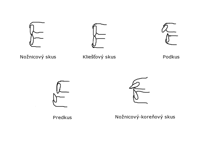 Popis: Skus psa Zdroj: vlastný obrázok (inšpirovaný obrázkom č. 3 na strane 24 z knihy: Dostál, J.: Genetika v kynologické praxi. Dona. 1995. ISBN 80-85463-58-X) Dátum: 2.1.2006 Autor: Prskavka Povolenie: PD Iné verzie tohto súboru: nie